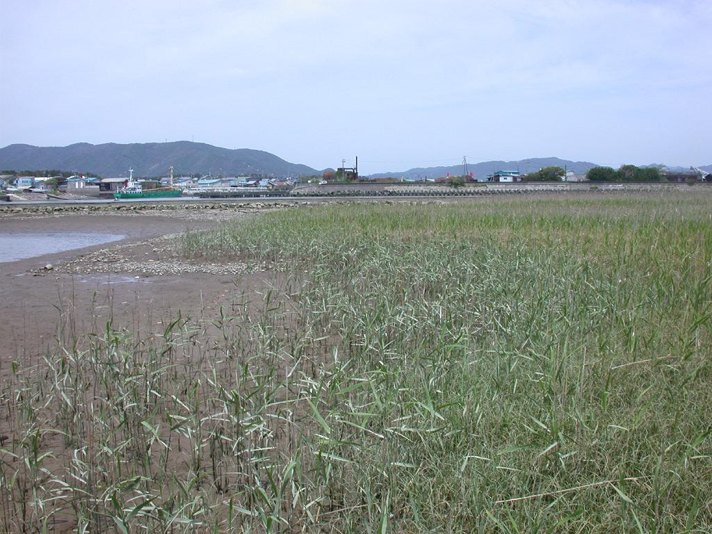 2005/05/08 和歌山県御坊市：Gobo City. Wakayama Pref. Japan